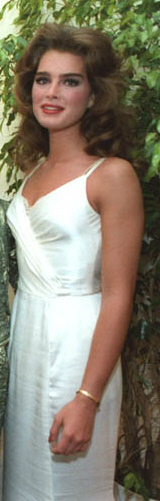 Bildausschnitt von Brooke Shields im Kennedy Center am 20. Mai 1983 anlässlich des Gedenkens an den 80. Geburtstag von Bob Hope.